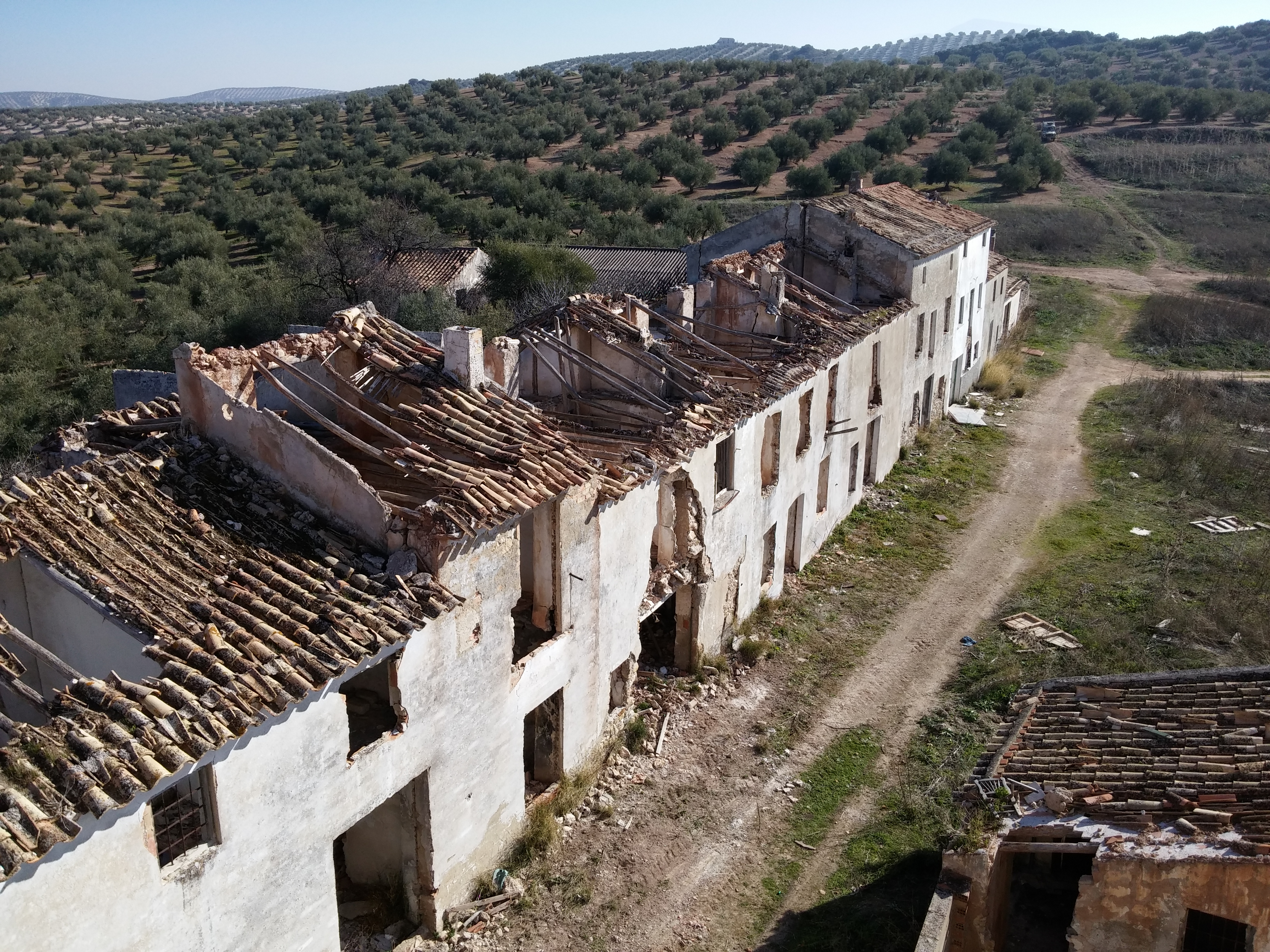 Cortijos en ruinas de la aldea de El Castil, con el cortijo de San Bartolomé en medio de ellos.